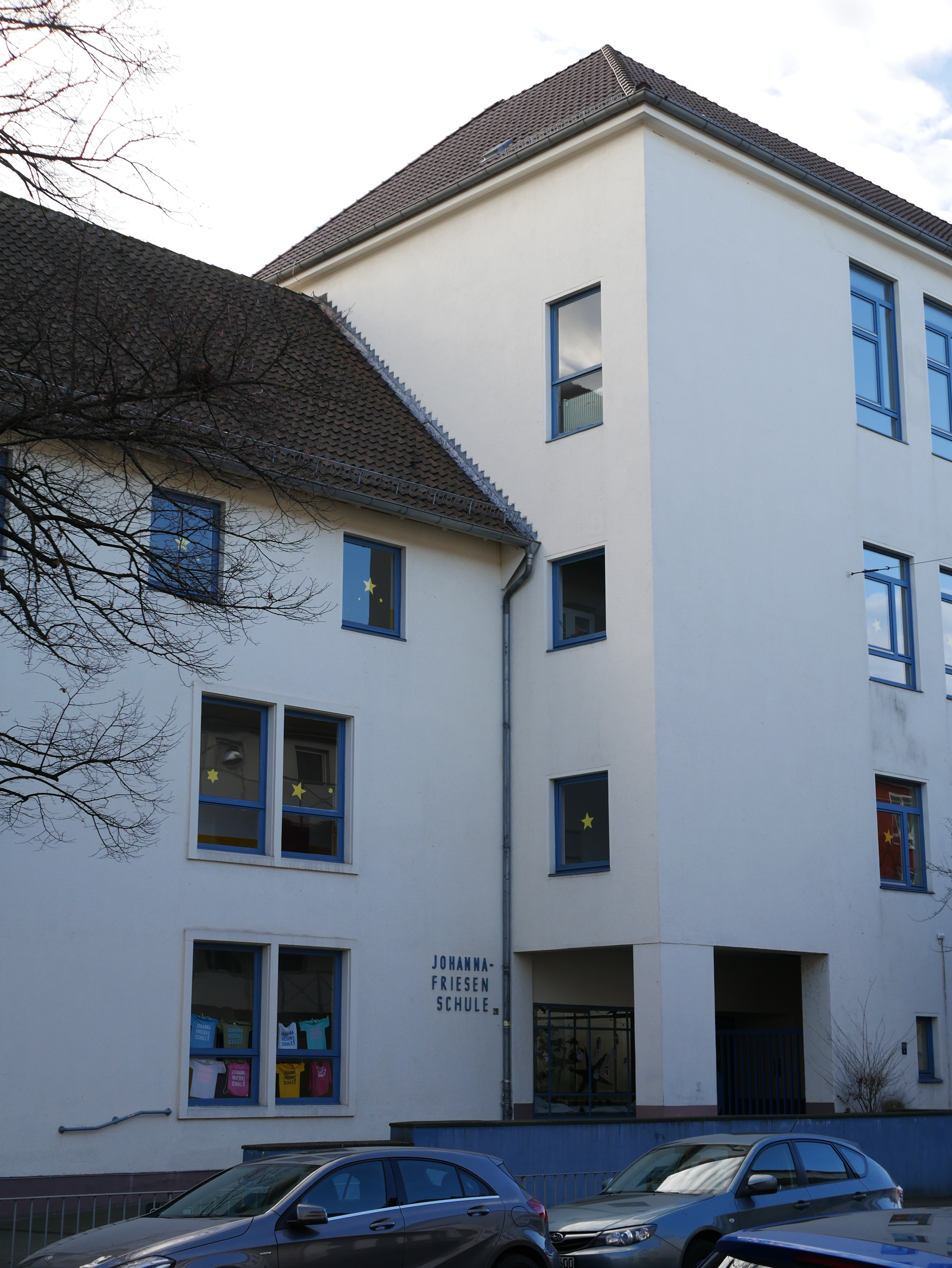 Johanna-Friesen-Schule Hannover